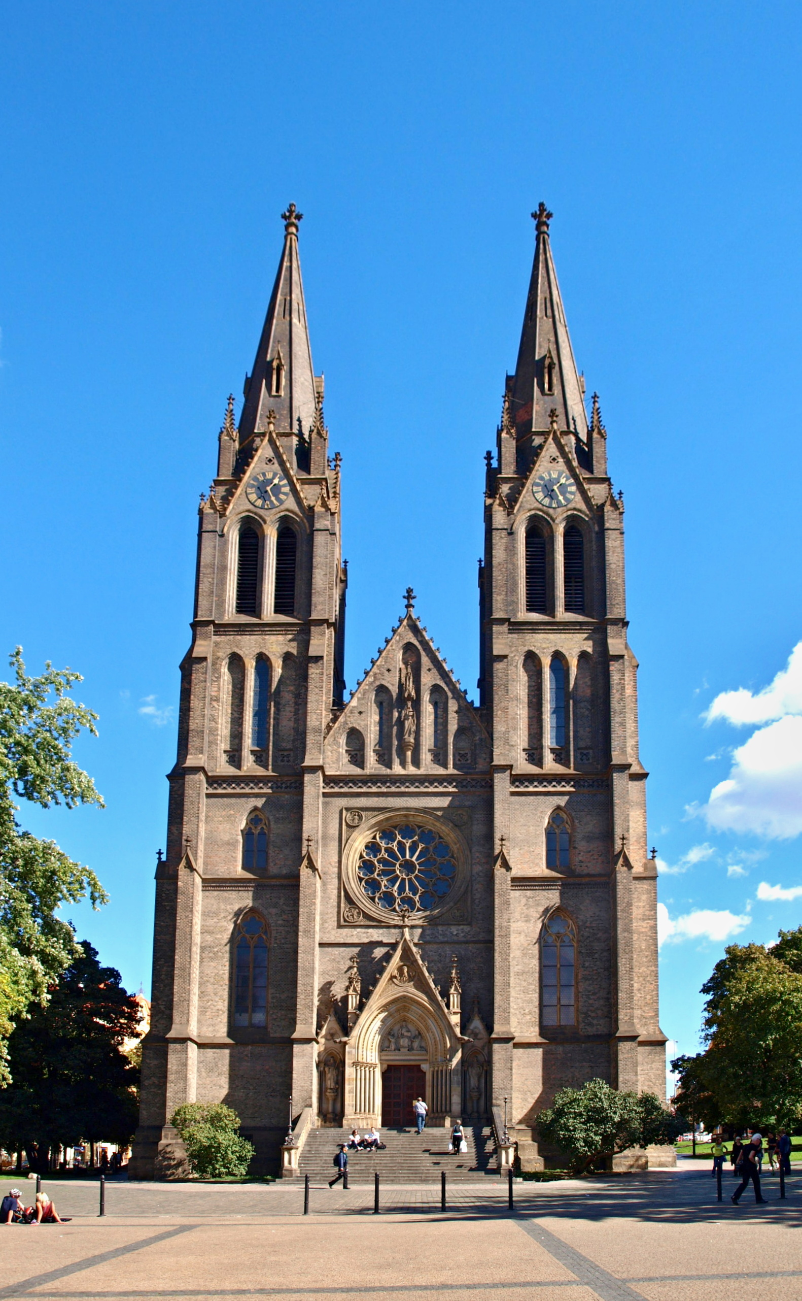 Náměstí Míru